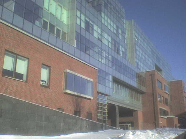 Москва, ул. Льва Толстого, 16.Одно из зданий бизнес-центра «Красная роза», офис «Яндекса».